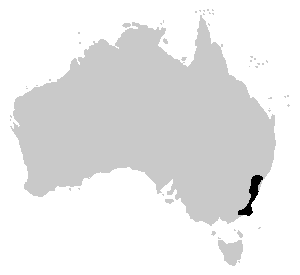 Litoria littlejohni; carte de distribution (Australie)